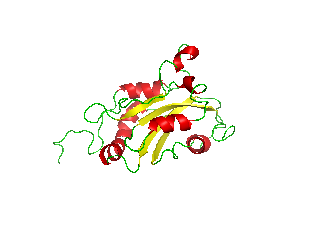 Destrin